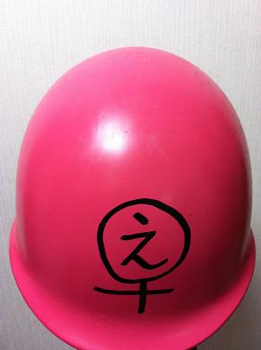 深夜番組『映画楽園 〜シネパラ〜』のコーナー番組「THE NEXT 金曜ロードショー」に登場するピンクヘルメット。